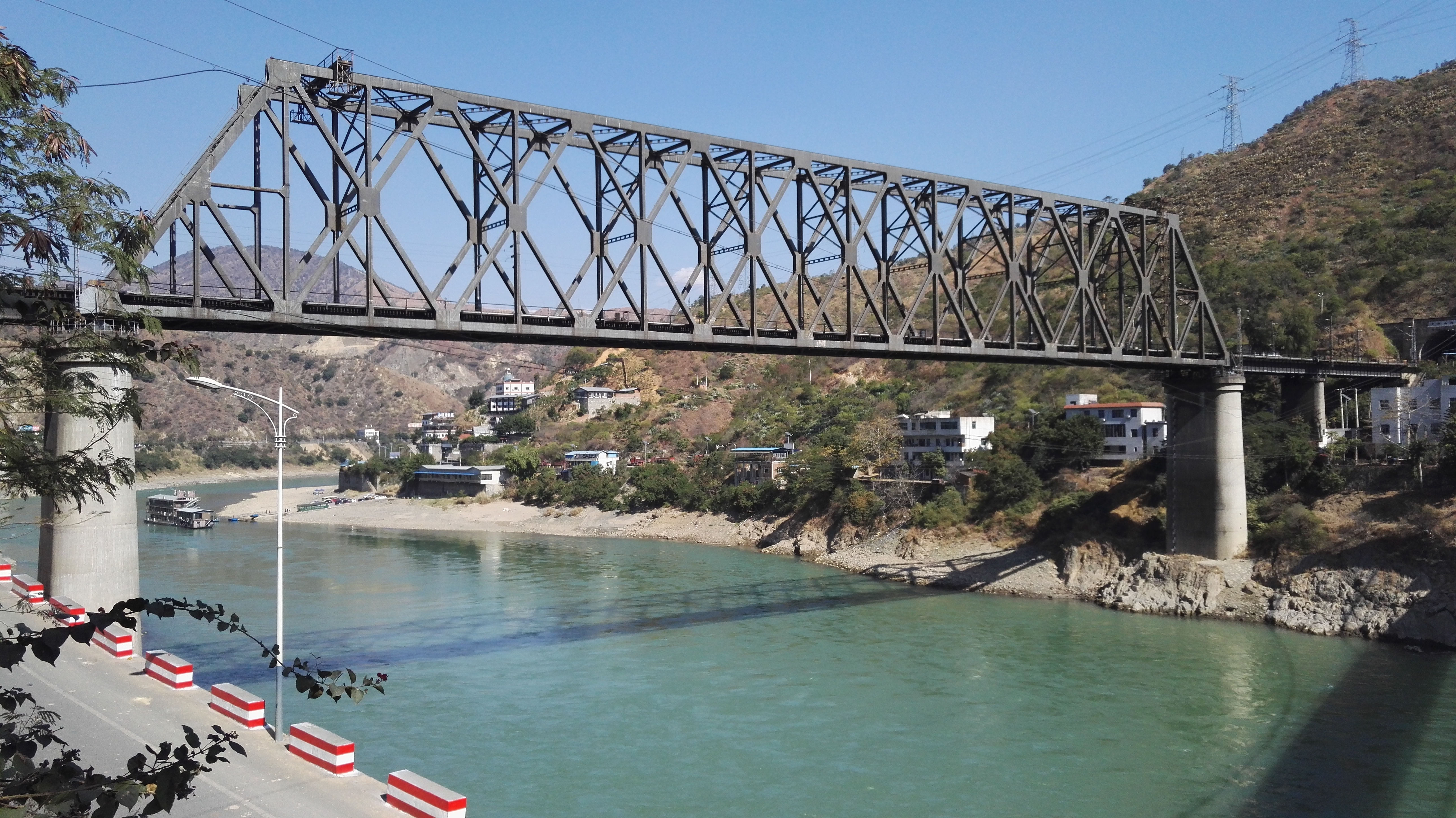 成昆铁路渡口支线雅砻江大桥是一座双线铁路钢桁梁桥，位于四川省攀枝花市雅砻江注入金沙江的交汇口。铁路桥与310省道和214省道的新旧两座雅江桥在雅砻江口并排跨江。并与附近金沙江上的214省道倮果大桥、丽攀高速公路青龙山大桥和成昆铁路扩能改造工程金沙江大桥共同形成了两江跨六桥的景观。